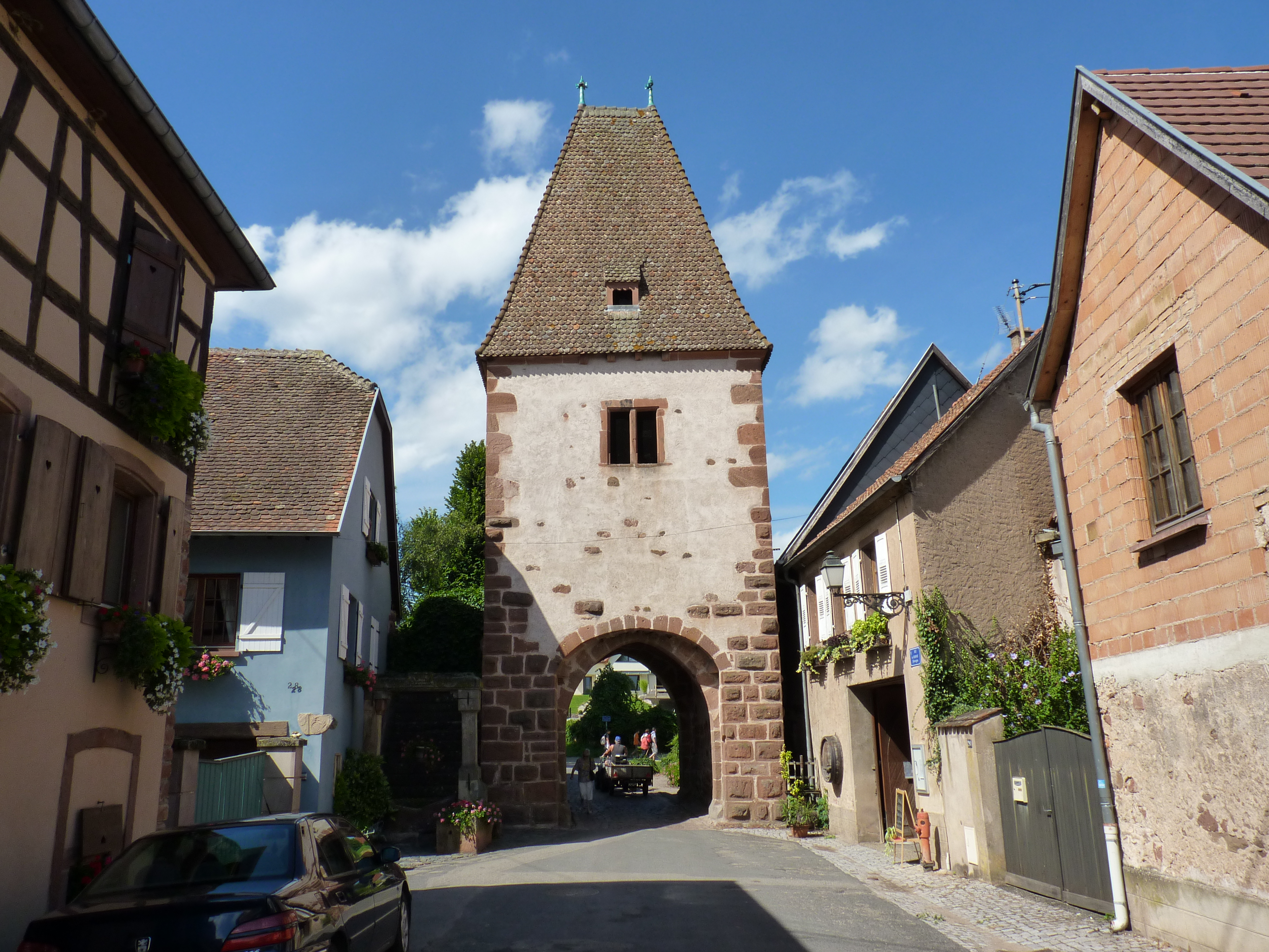 La tour arrière ou Aftertor (nord de la ville), 1340